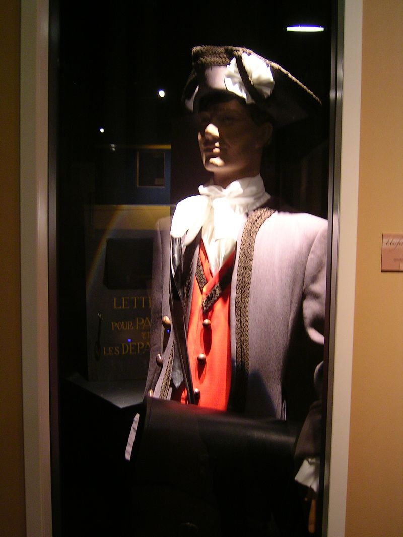 Facteur au XVIIIè siècle Photo personnelle (own work) de Marianna